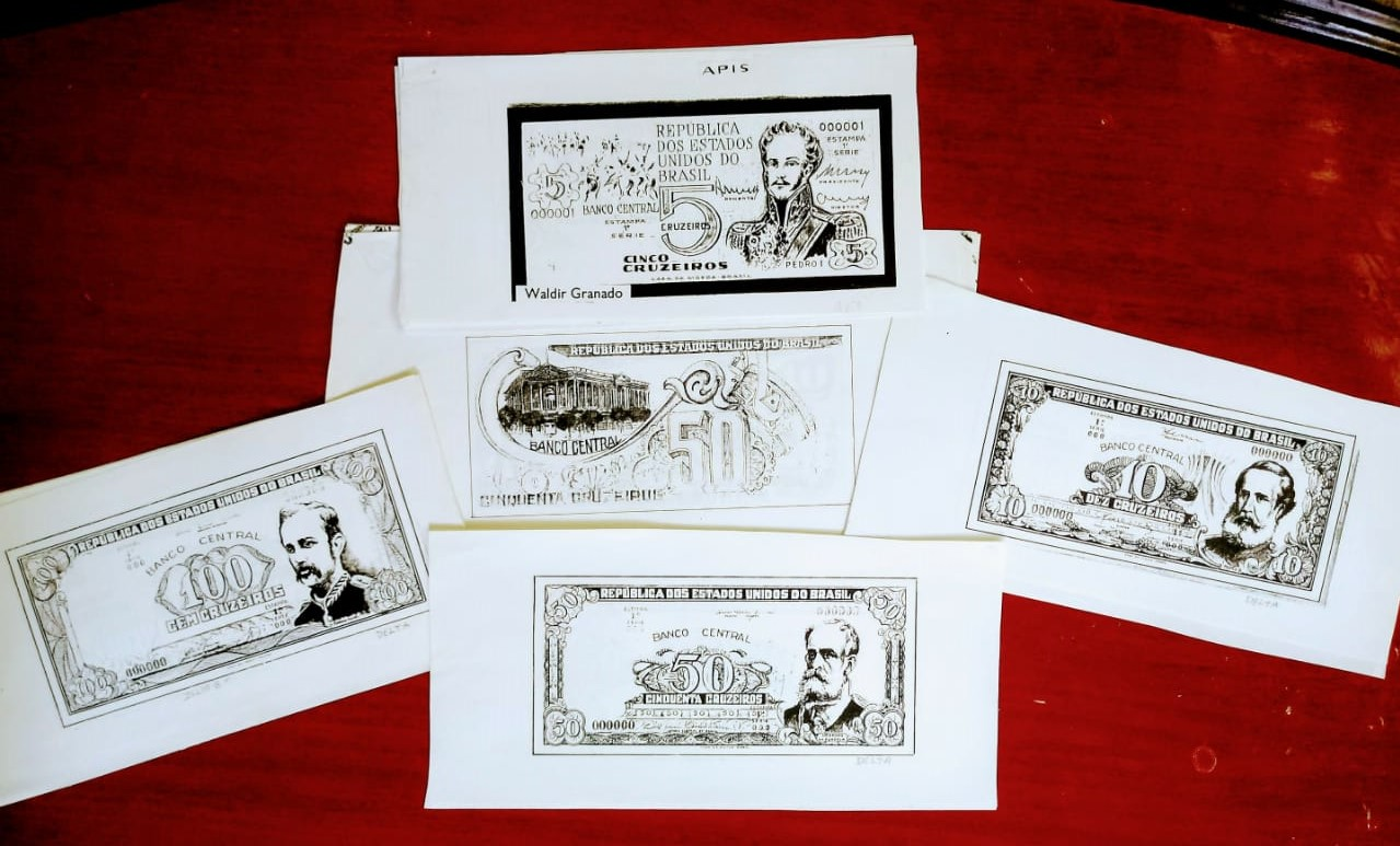 Scans de cédulas que participaram do concurso de 1966 para a escolha do padrão para as cédulas da unidade monetária brasileira da época, o Cruzeiro (1970–1986).